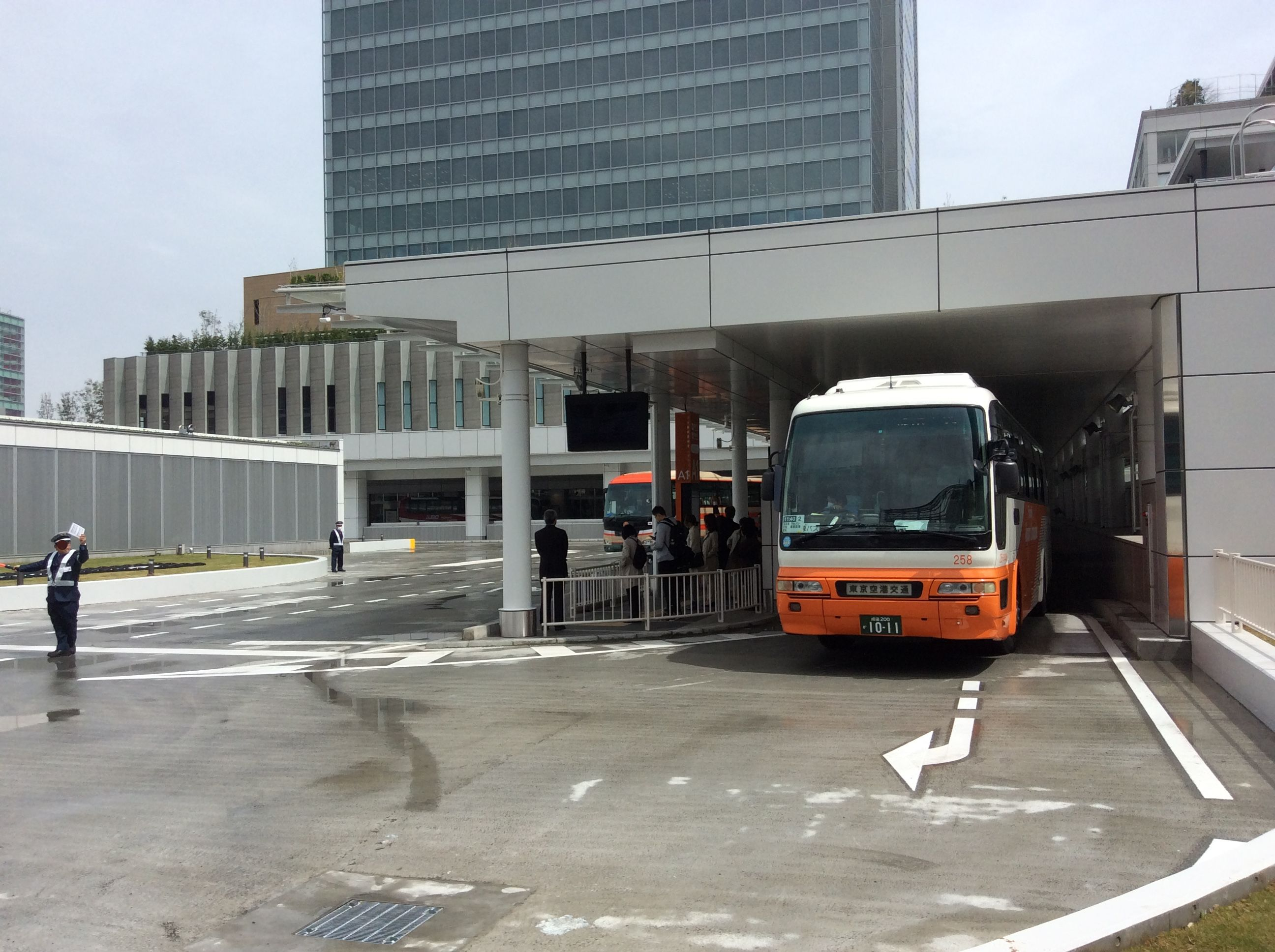 JR 新宿ミライナタワー